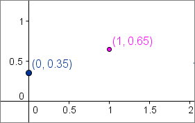 Бернулиев опит - Закон на распределба (pdf) за p=0,35